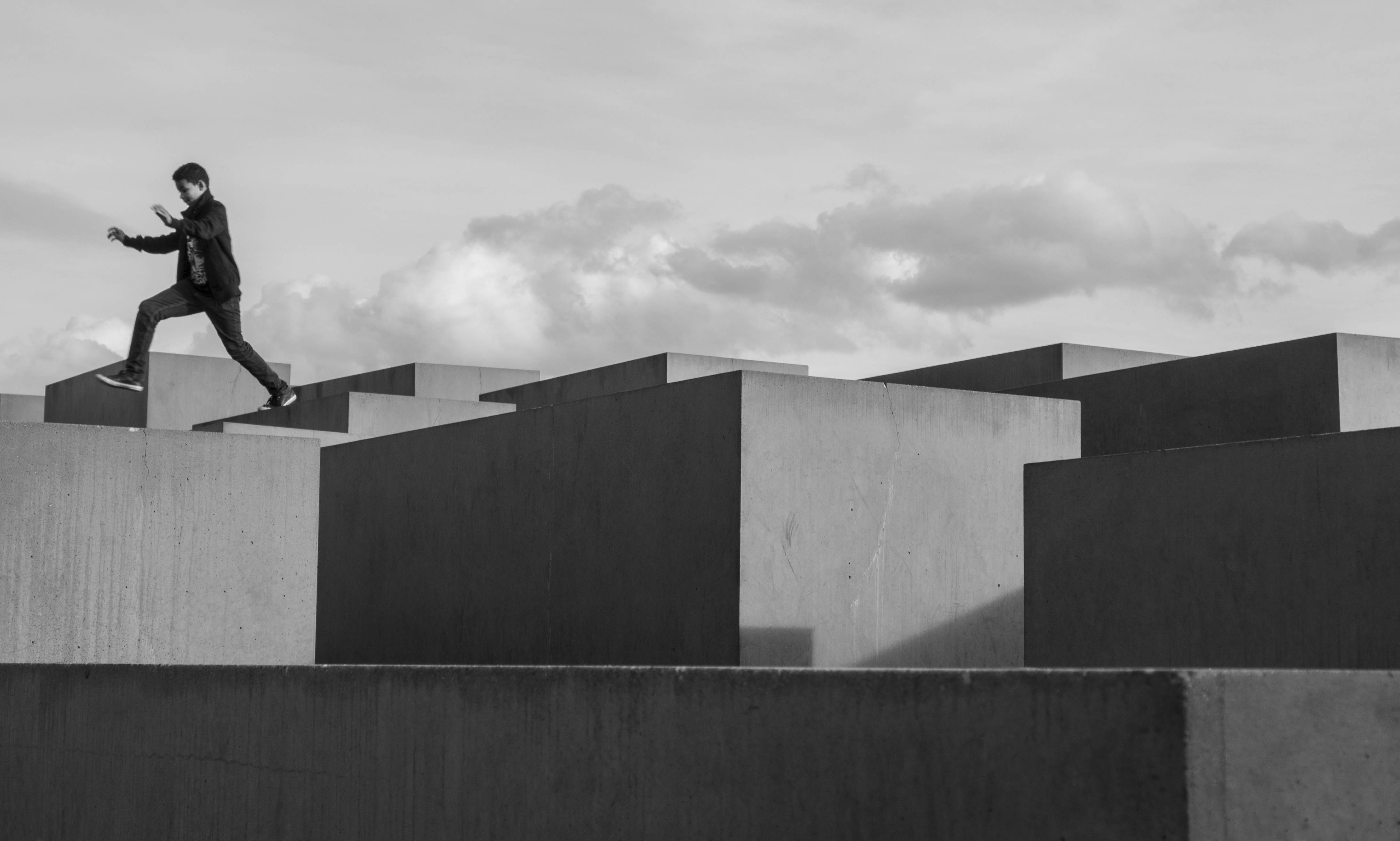 Holocaust-Mahnmal in Berlin: ein über Betonstelen springender Junge.